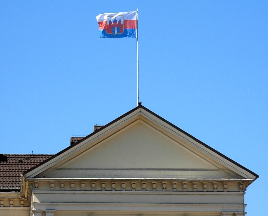 Flaga Bydgoszczy na ratuszu